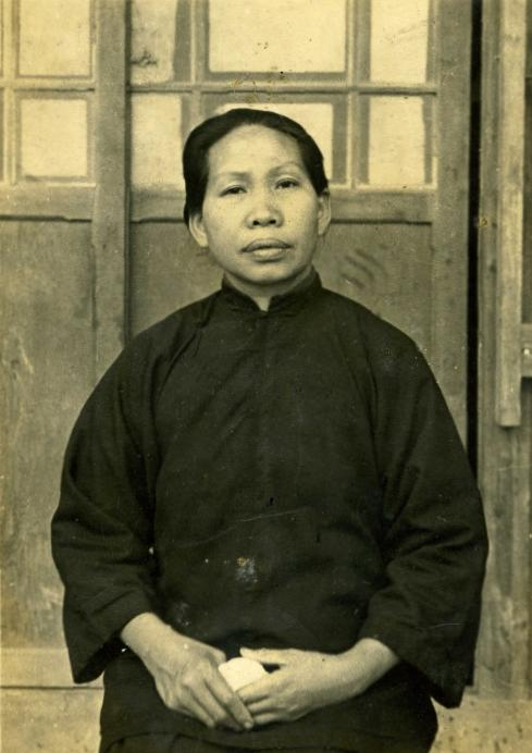 蔣渭水元配 石有女士晚年獨照